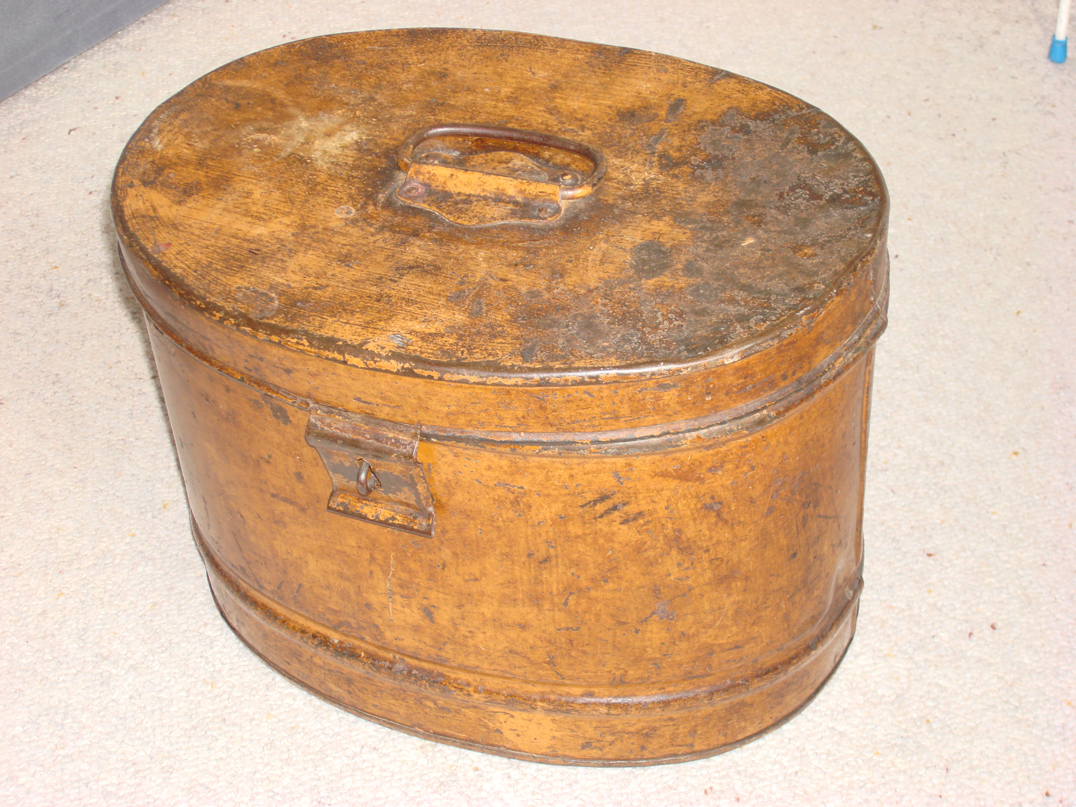 A hat tin